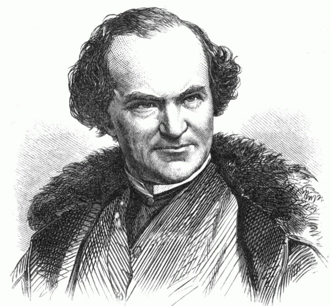 Bogumil Dawison (1818 - 1872), polnisch-deutscher Schauspieler